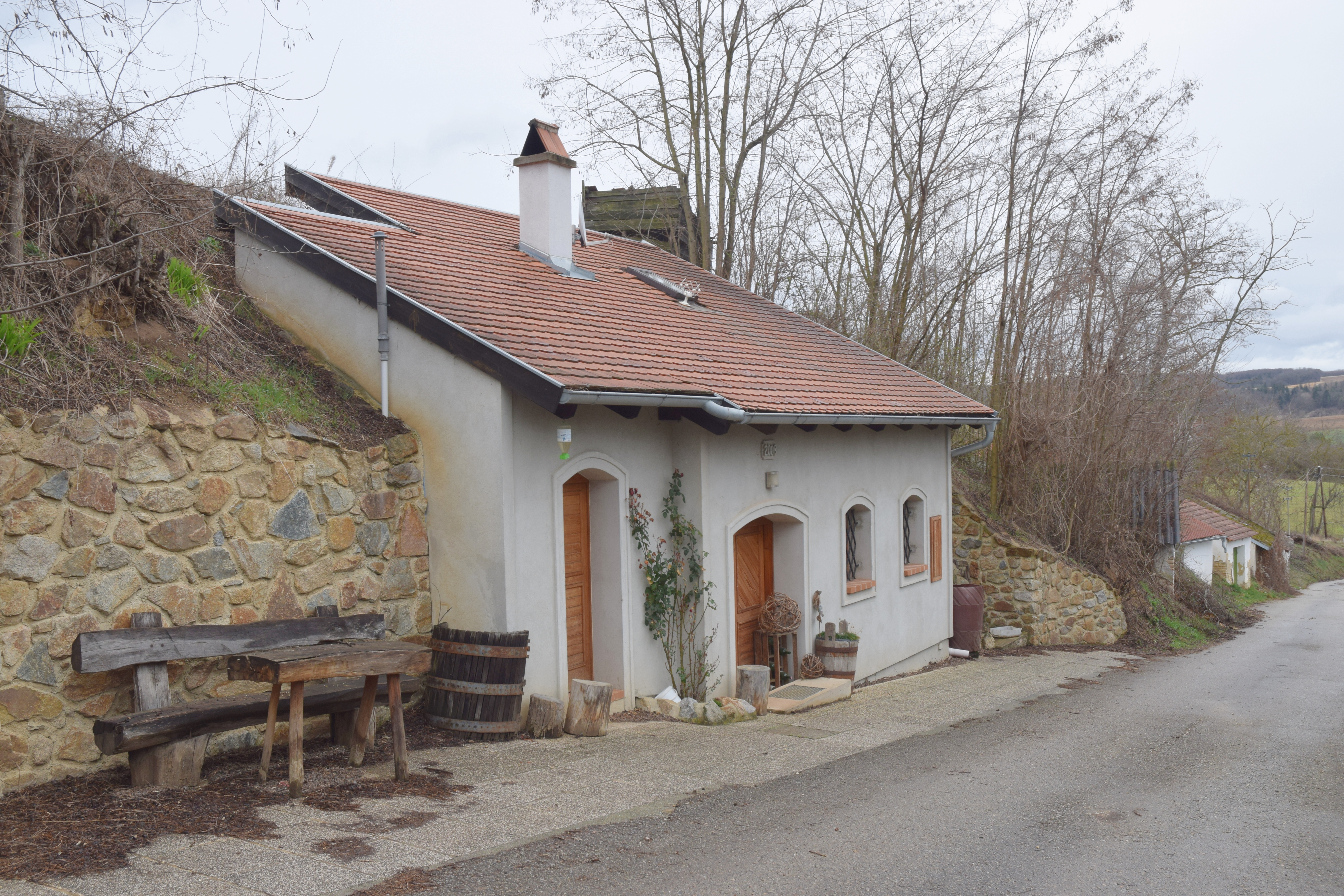 Kellergasse Im Entental in der KG Oberthern in Heldenberg